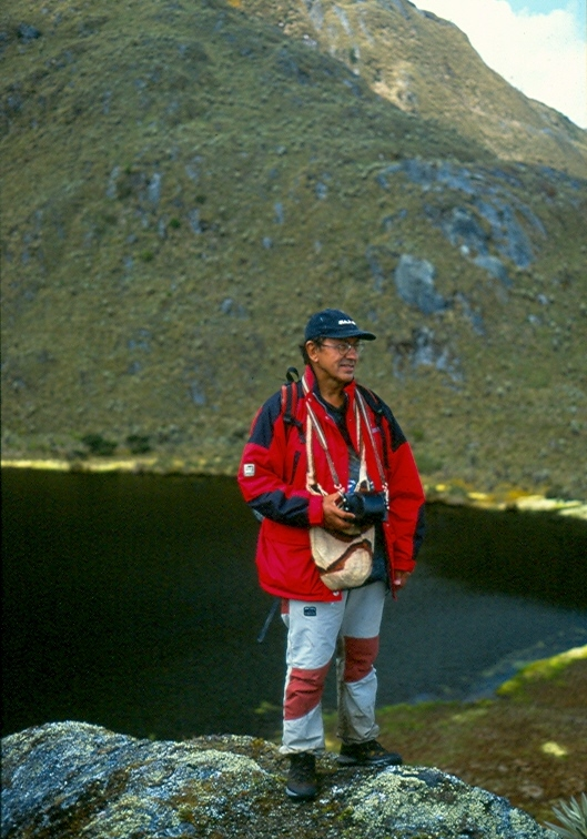 Andrés Hurtado